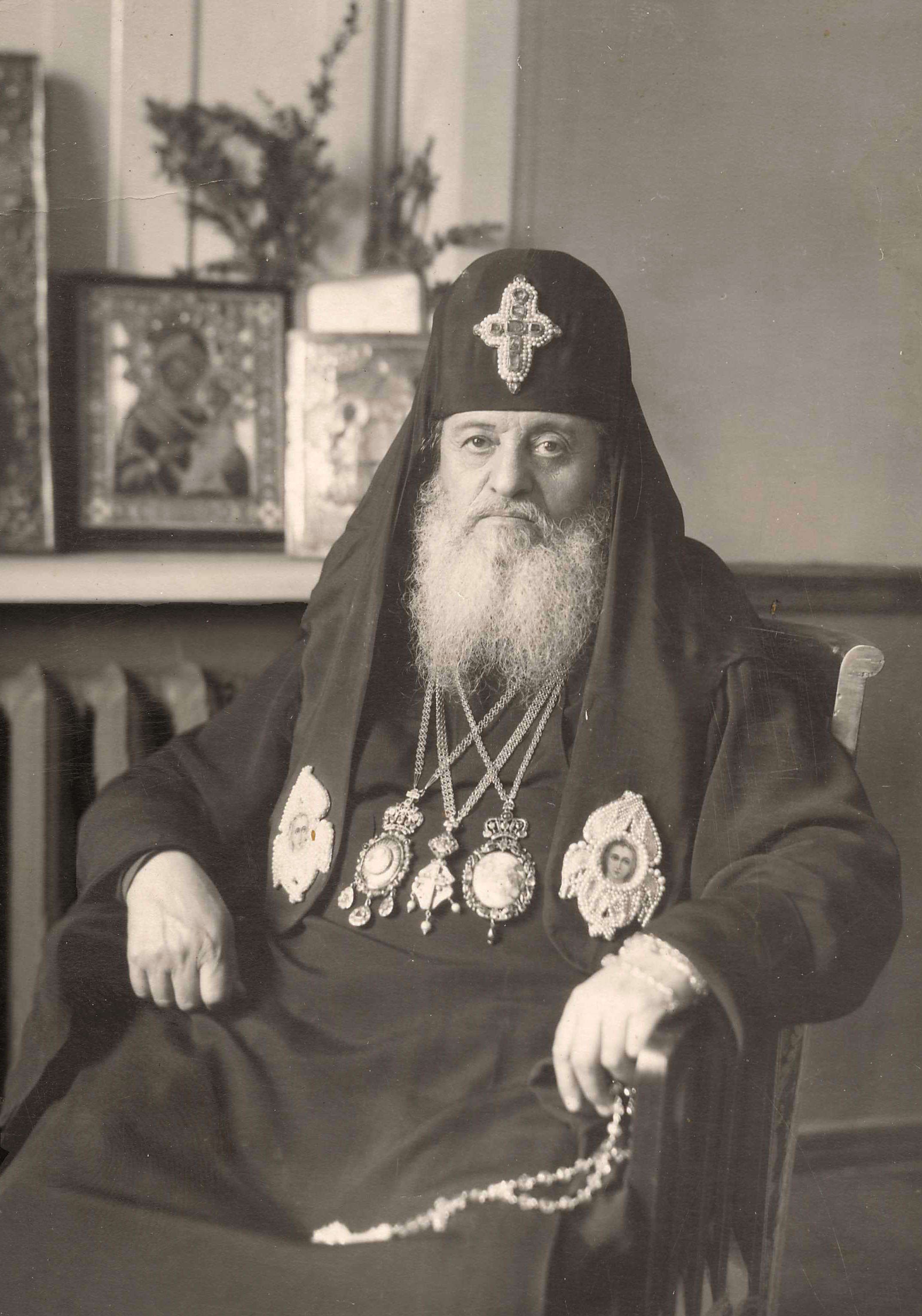 საქართველოს კათოლიკოს-პატრიარქი ეფრემ II